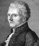 Jean-François Collin d'Harleville, Französischer Dichter Ende des 18. Jhdts.